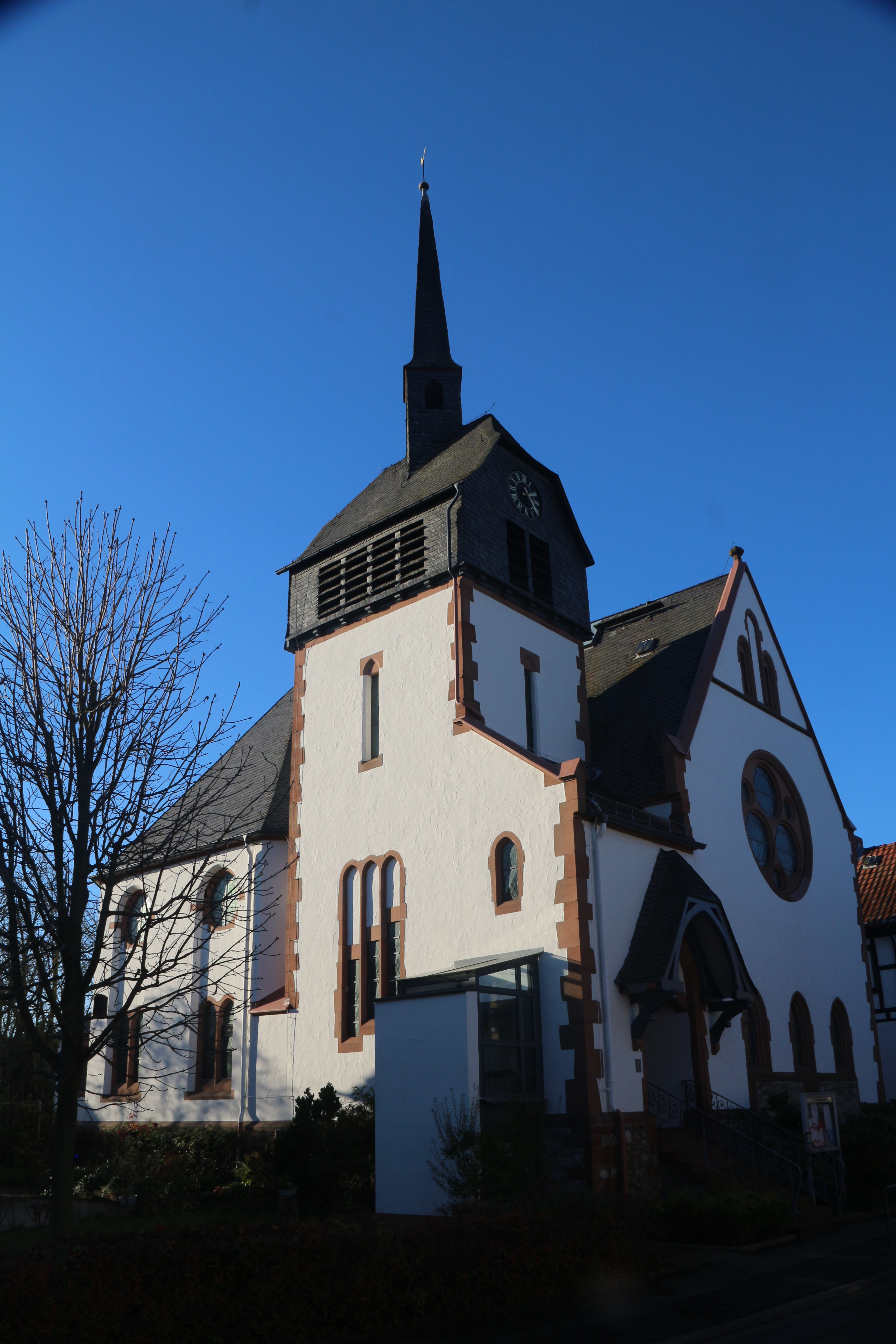 Fellingshausen